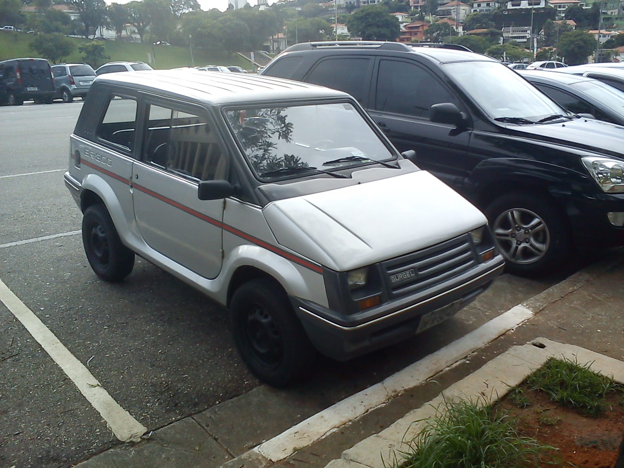 Cena - carro econômico nacional motor fabricado no Brasil